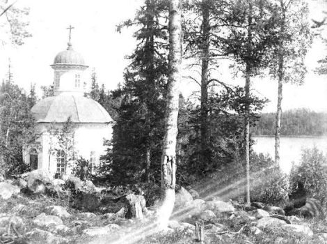 Соловецкий монастырь. Часовня архистратига Михаила у подножия Секирной горы.